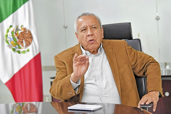 Foto de Francisco Garduño como Comisionado de Migración